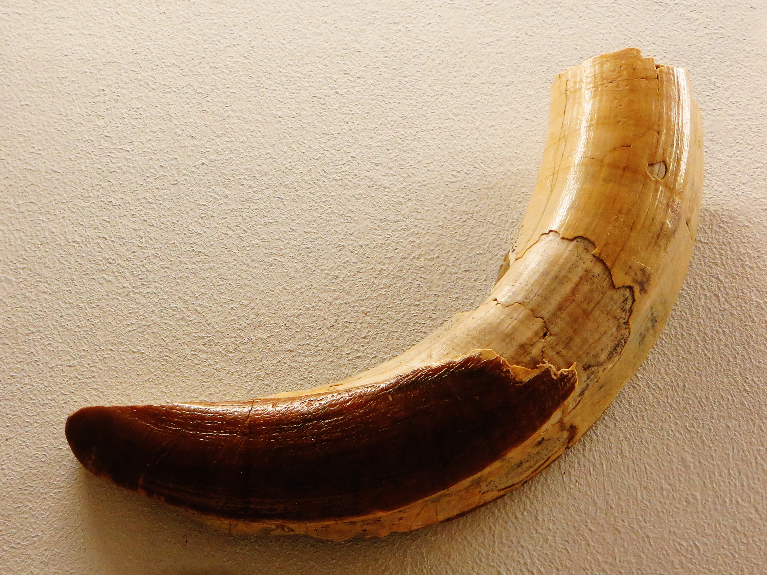 Fossil of Parastrapotherium, an extinct mammal - Took the picture at Museum of Paleontology, Tuebingen